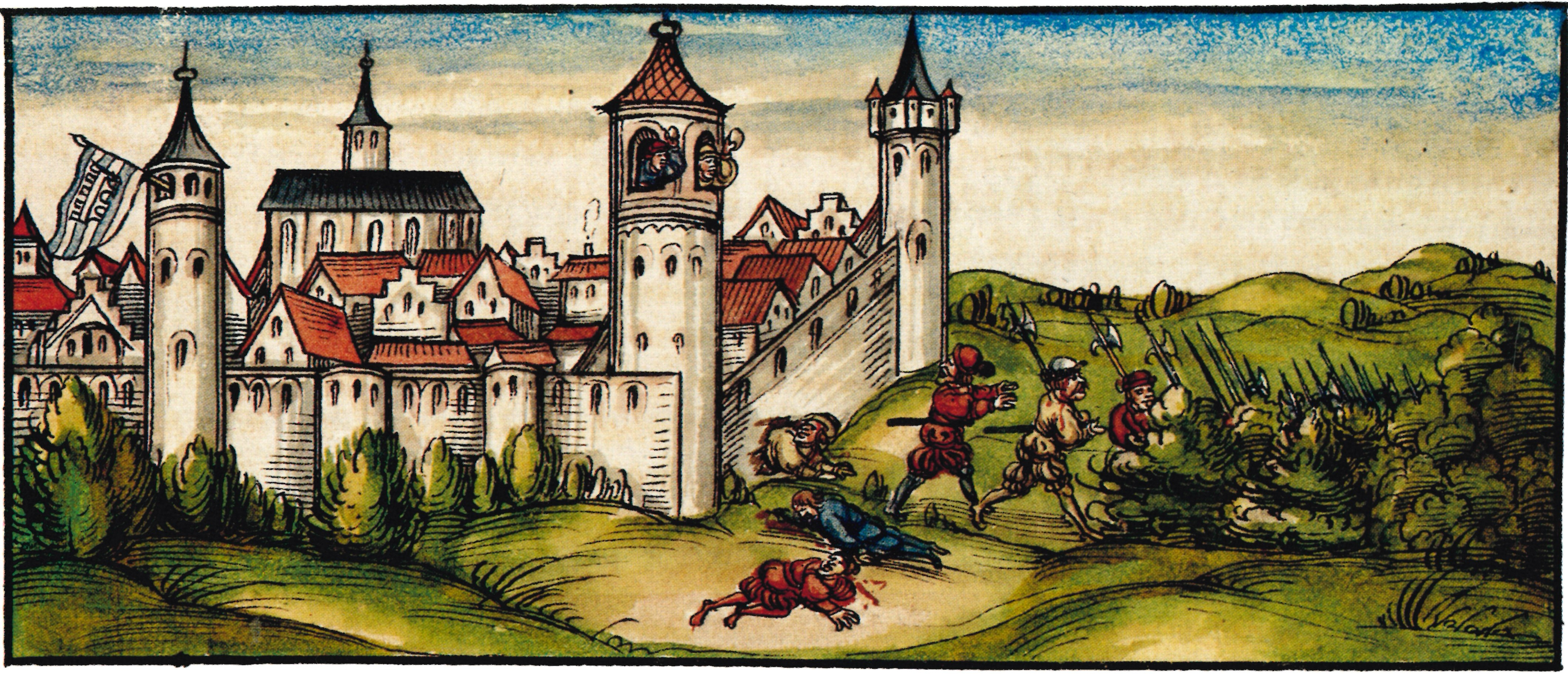 Lorenz Fries, Bischofschronik von Würzburg, Folio 319r, Flucht der Kitzinger aus Stadtschwarzach 1460